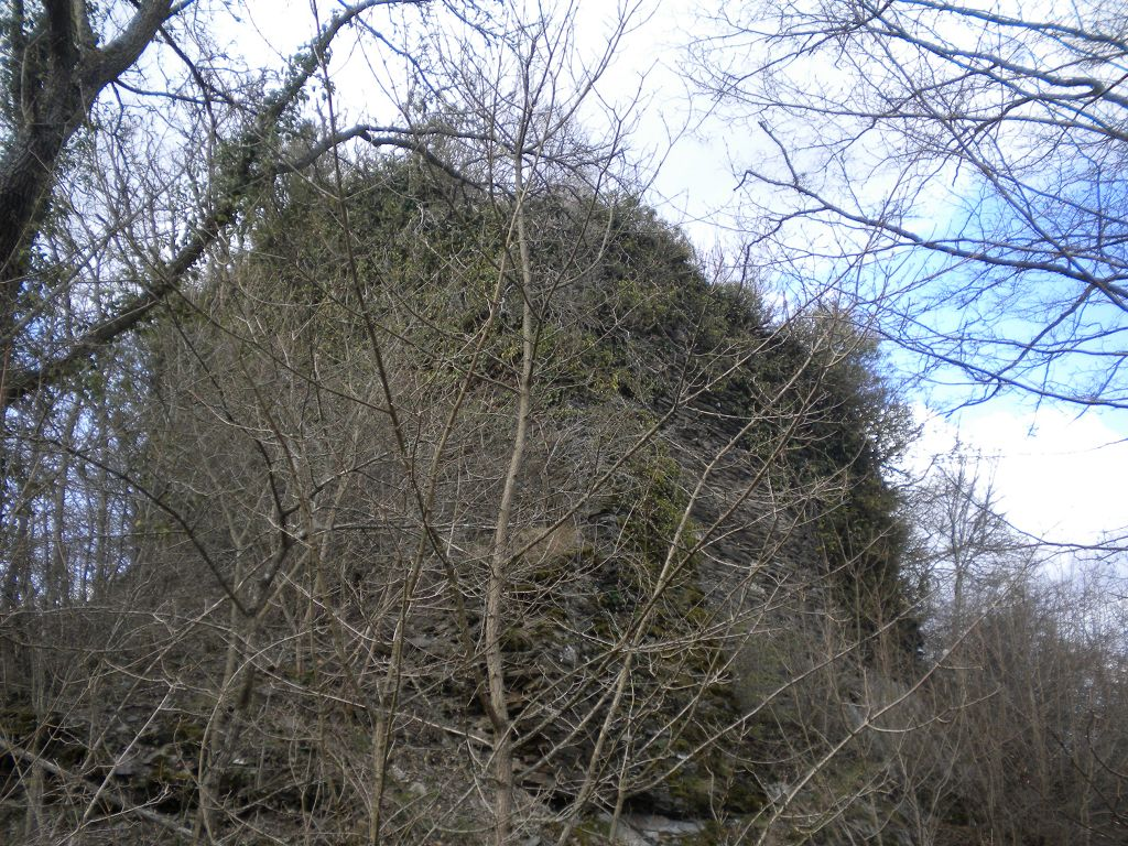 Burgruine